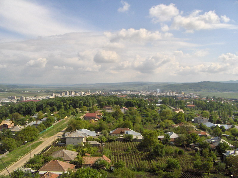 Panorama orașului Vaslui; văzută din nordul orașului.